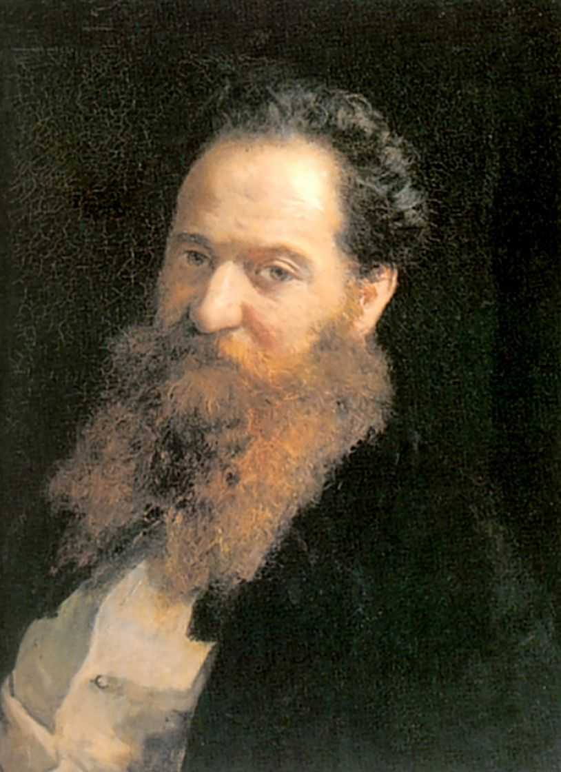 Ге Николай Николаевич. Портрет физиолога доктора Морица Шиффа. 1876